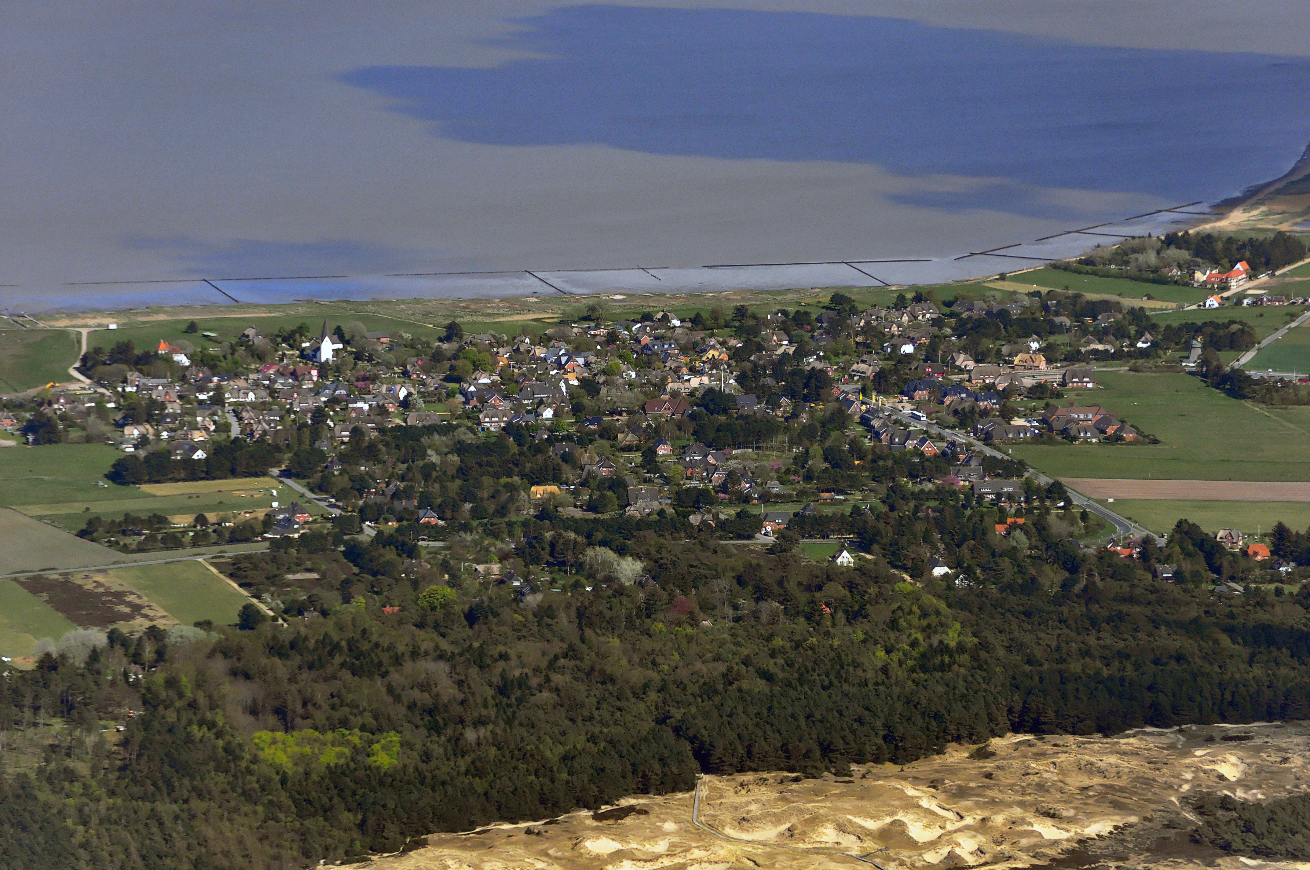 Luftbilder von der Nordseeküste 2012-05: Nebel auf Amrum